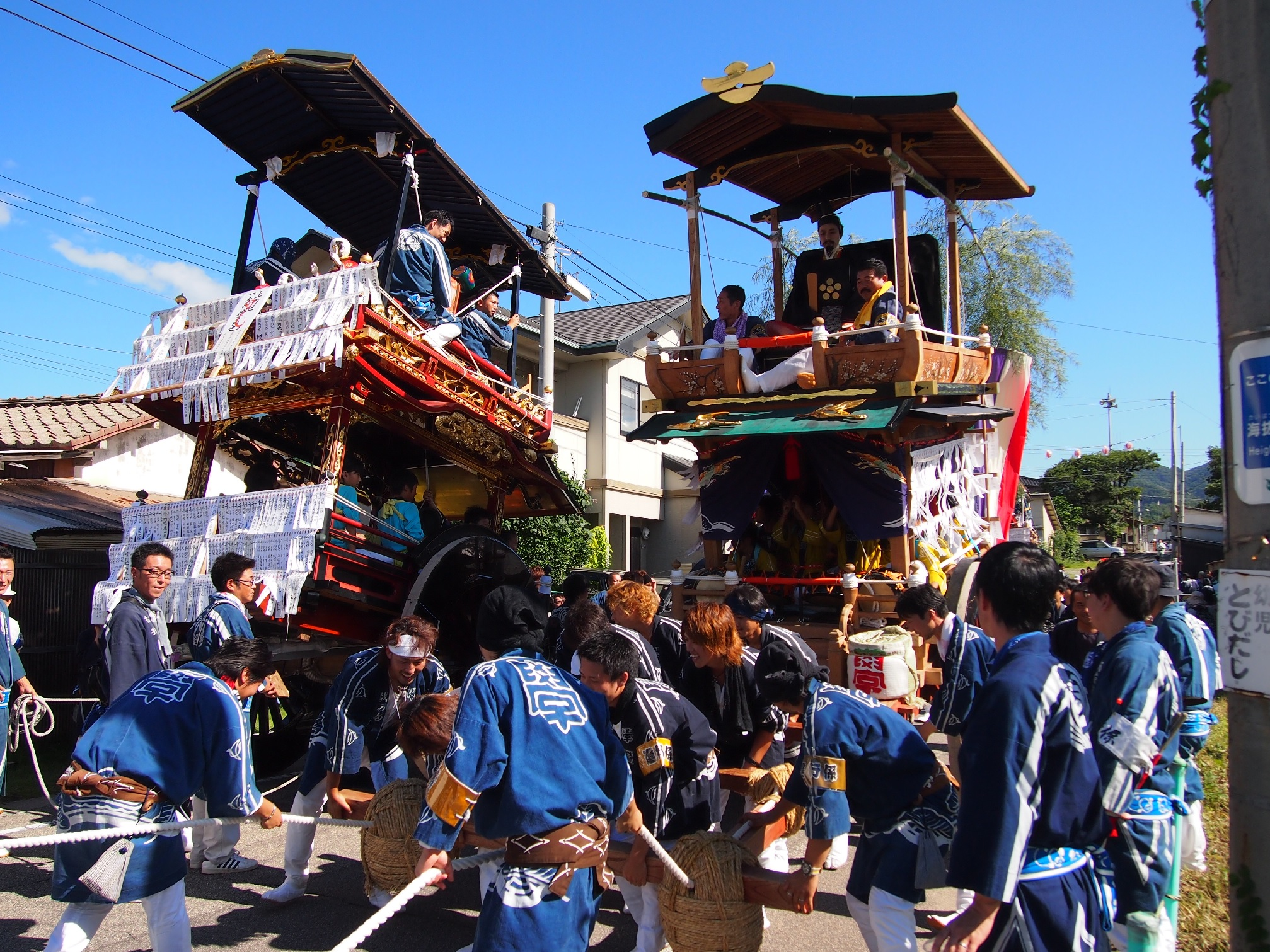 本祭り（松波町でのすれ違い、上町・学校町）